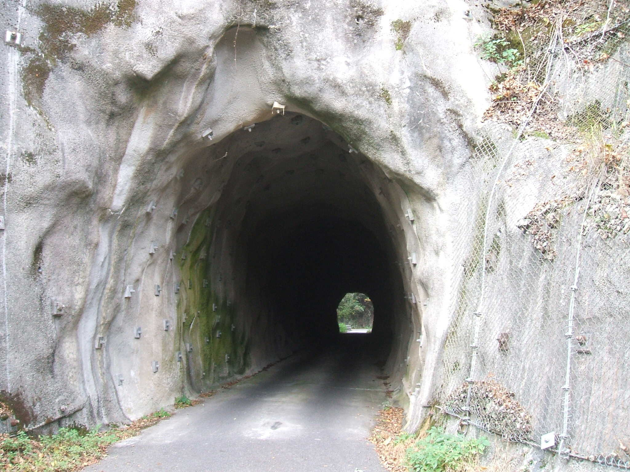 広島県福山市山野町にある猿鳴トンネル